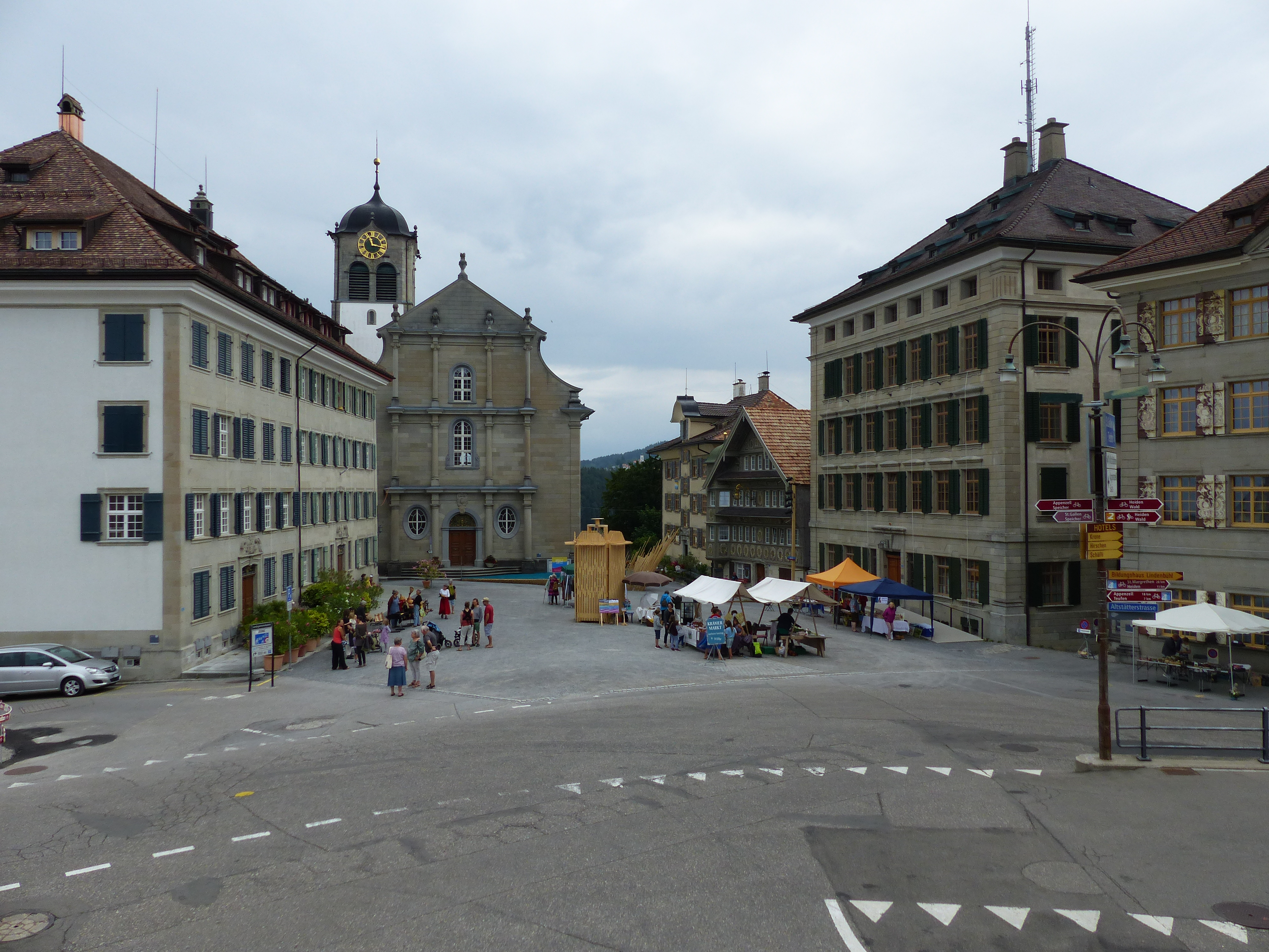 Landsgemeindeplatz Trogen mit Reformierter Kirche (hinten) und Zellwegerschem Doppelpalast (links)